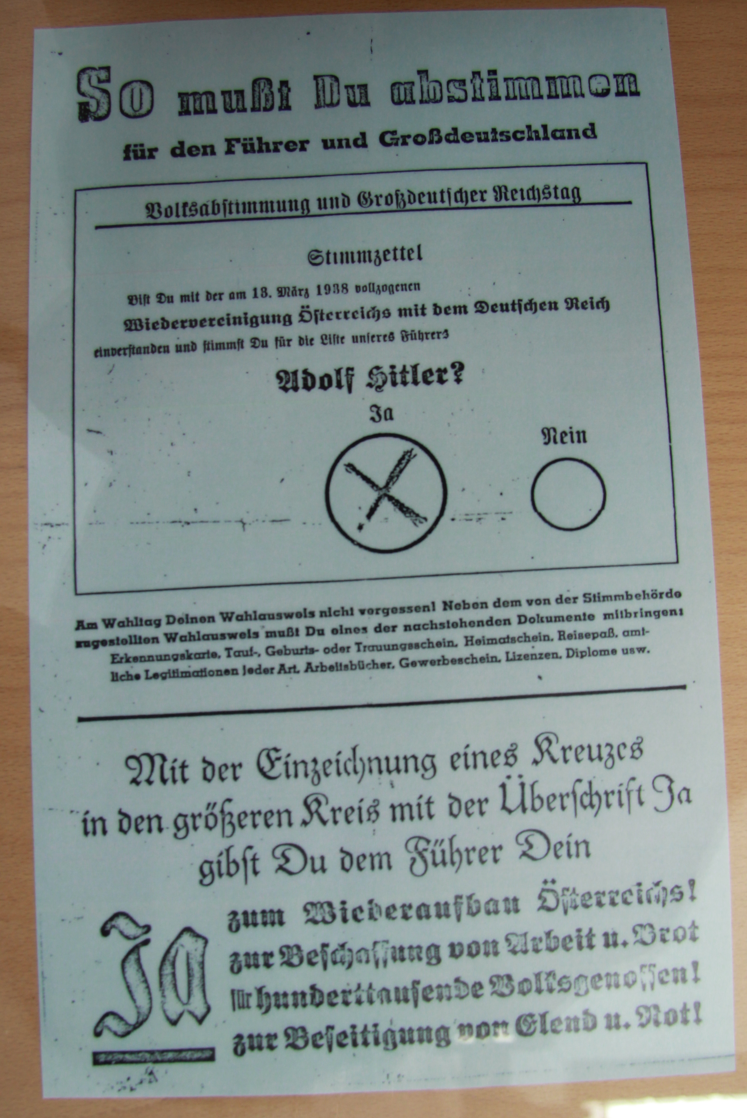 Industrieviertel-Museum in Wiener Neustadt, Niederösterreich - Stimmzettel zur Volksabstimmung nach dem Anschluss 1938